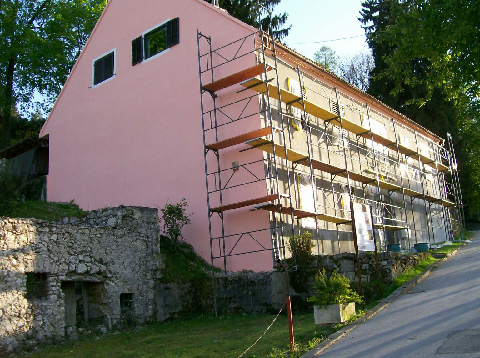 Muzej Marton u Samoboru